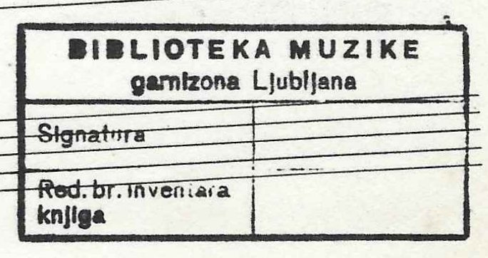 Biblioteka muzike garnizona Ljubljana 0